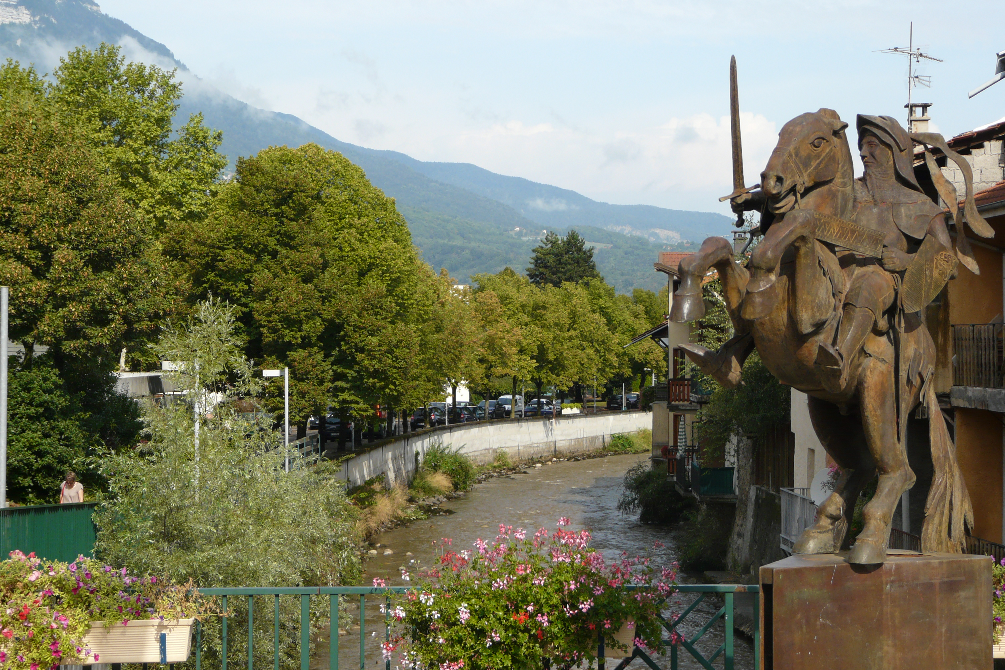 Le Bréda à Pontcharra, Isère, France, avec à droite une statue du Chevalier Bayard et au fond le mont Granier.